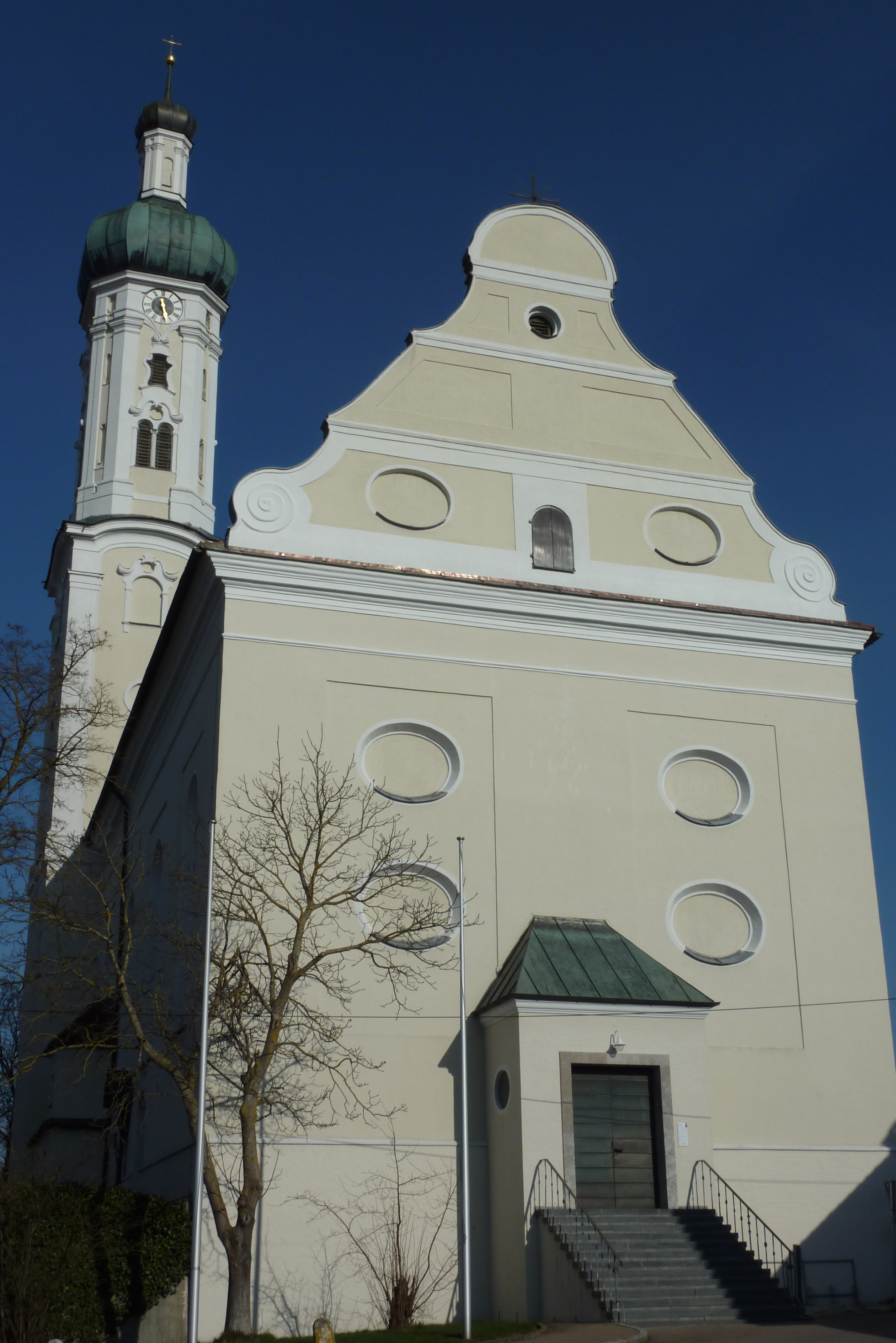 Katholische Pfarrkirche St. Martin in Pfaffenhofen an der Zusam im Landkreis Dillingen an der Donau (Bayern), Westfassade mit Turm